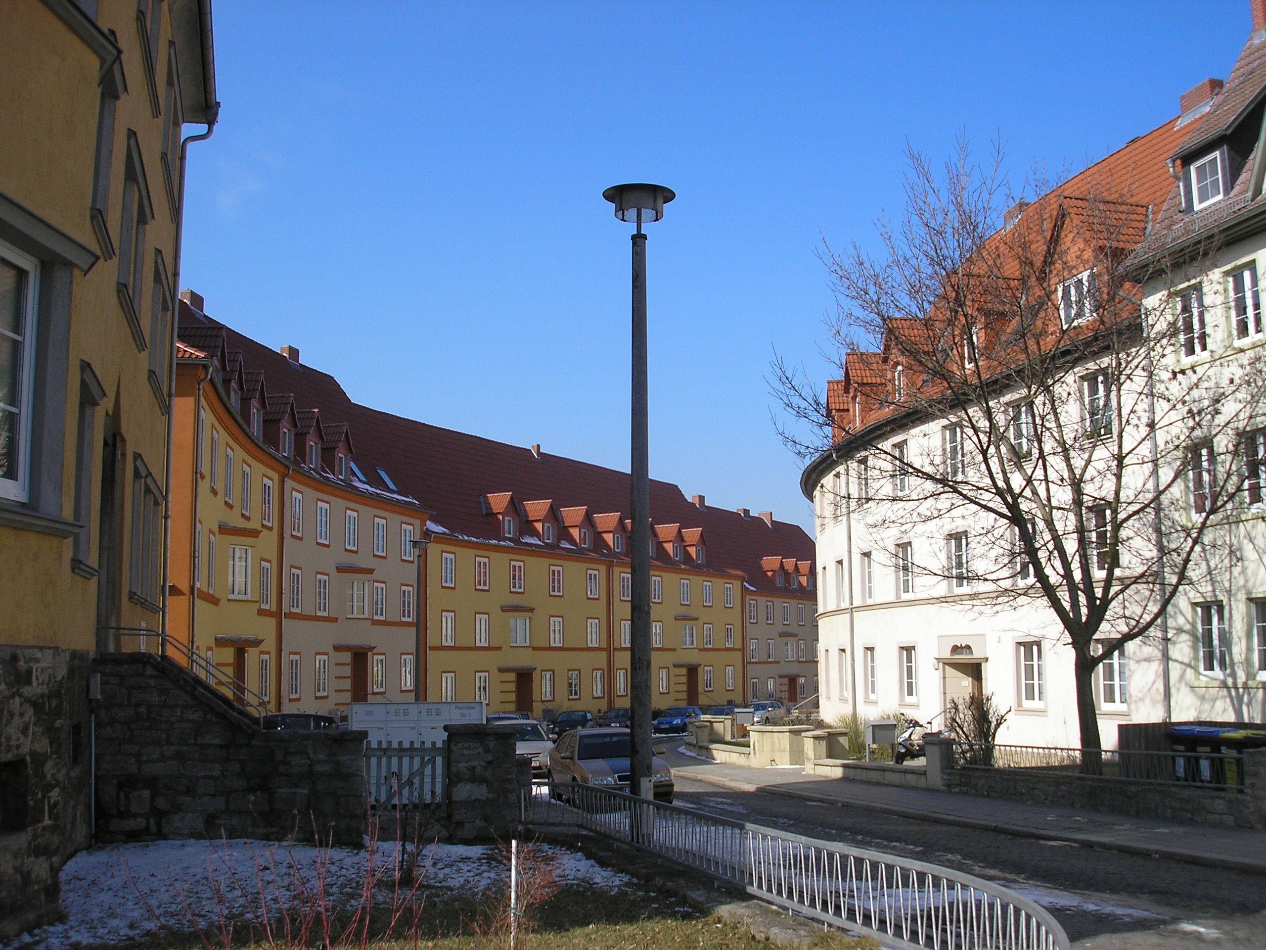 Die Reinthalerstraße in Erfurt.